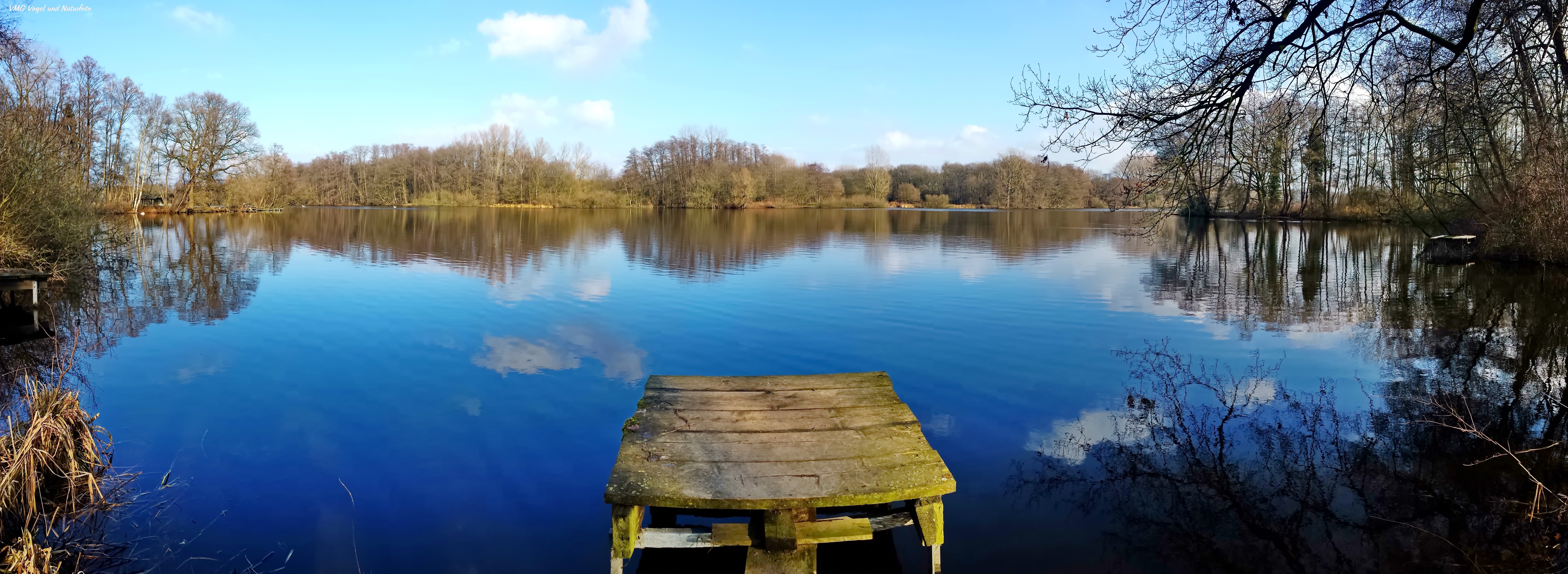 Ruhig ist der (Große) De Witt See in Nettetal (gelegen im LSG „Netteniederung“): schöne Heimat, schöne Natur.